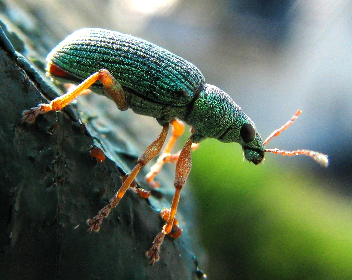 Rüsselkäfer silbrig-grün (Phyllobius argentatus) Polydrusus formosus, Oldenburg, Deutschland. Gut zu erkennen ist die für Polydrusus typische Fühlergrube, sowie die für P. formosus typischen relativ großen, wenig gewölbten Augen.